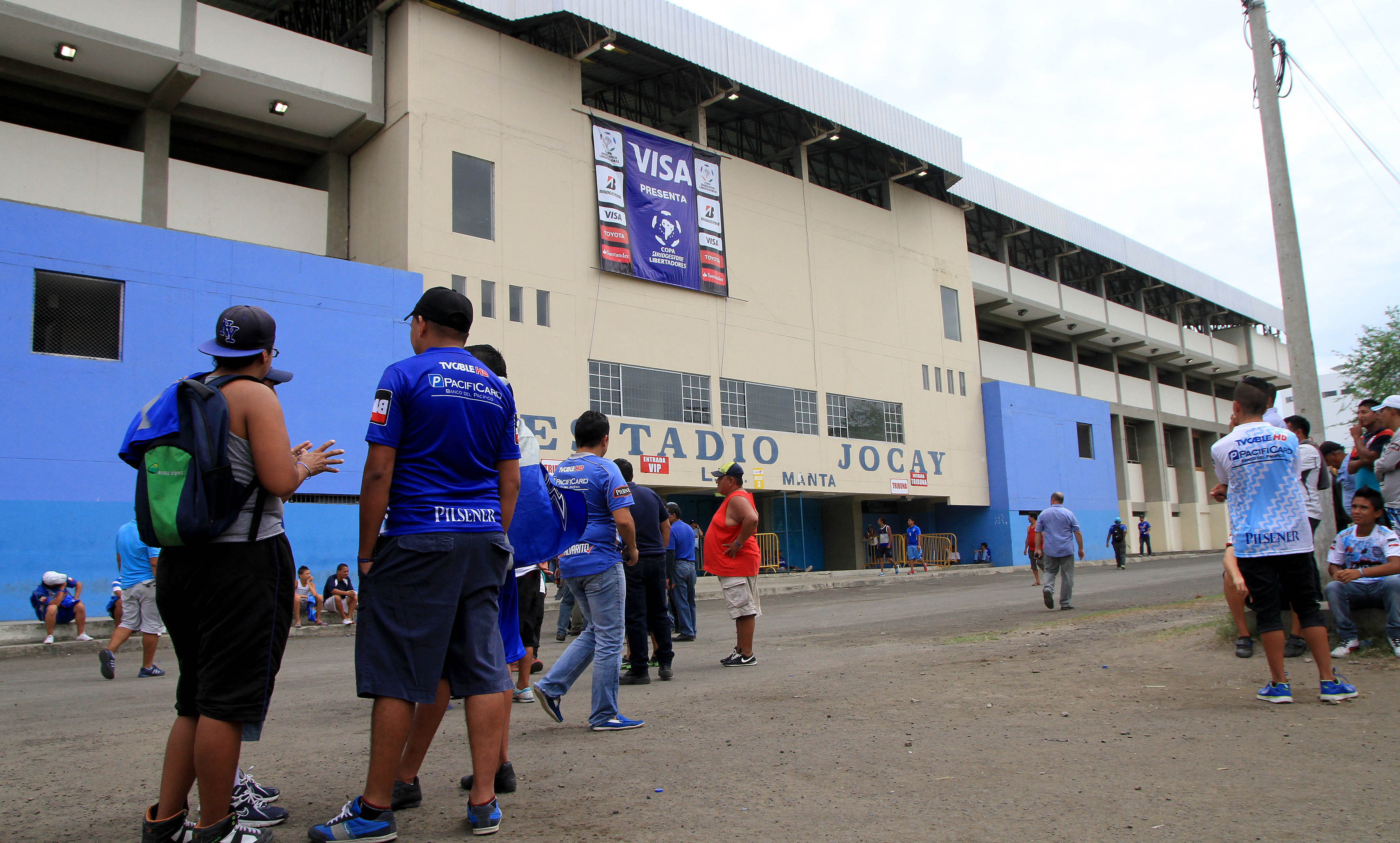 Manta, martes 24 de febrero del 2015 (ANDES).-Hinchas eléctricos se aprestan a disfrutar del encuentro entre Emelec y The Strongest de Bolívia, partido por Copa Libertadores que se disputará en el estadio Jocay de la ciudad de Manta, Manabí. Foto:César Muñoz/ANDES